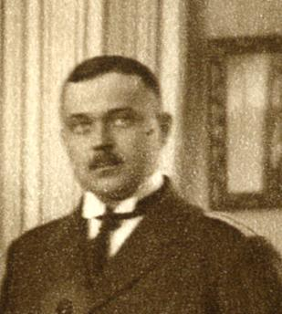 Kolonel Viktor Puskar (et)